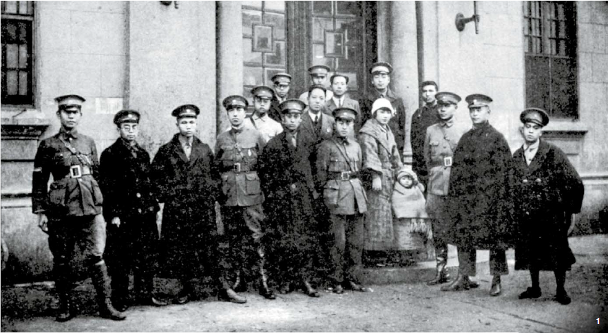 校長辦公廳機要秘書時代の陳立夫（前列左第六）。前列右三人目は特務処処長楊虎。陳立夫と楊虎の間の女性は楊虎や軍統局長戴笠の愛人となった陳華。